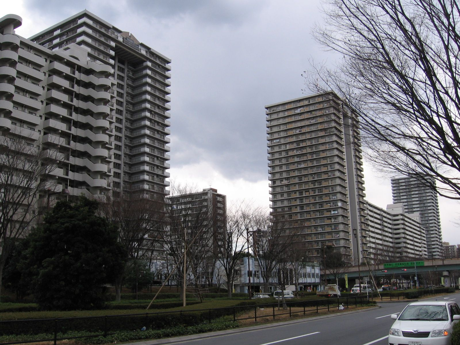 Hikarigaoka, Nerima, Tokyo.